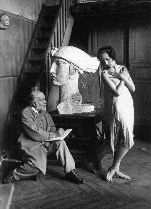 Le sculpteur Bourdelle et la danseuse américaine Miss Grace Christie : photographie de presse